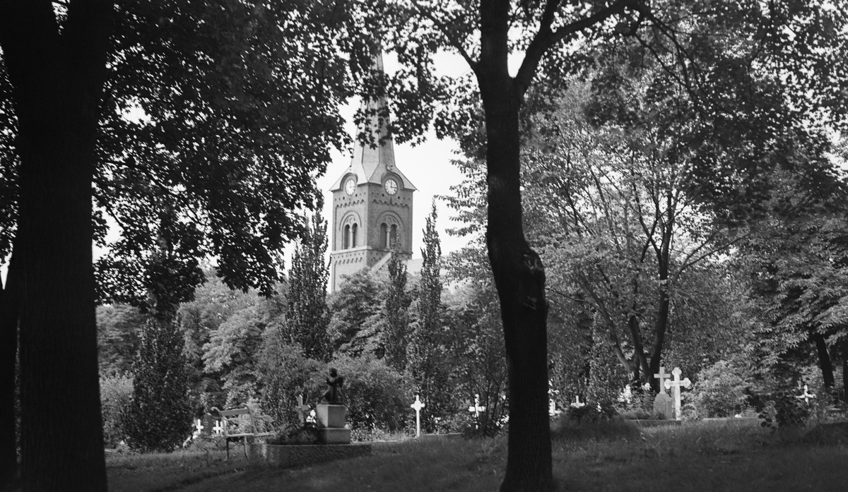 Sofienberg med Sofienberg kirke i bakgrunnen, fra den tiden det var kirkegård øst for Rathkes gate. Foto: Inger Marie Munch (ca. 1920-årene), fra Oslo Museums samling i Digitalt Museum.